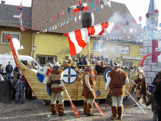 Maschgra in Schömberg